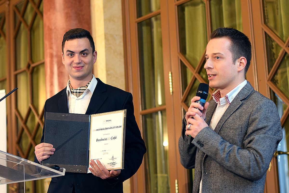 Az alapítók, Battay Máté és Tóth Patrik, amint átveszik "A leginspirálóbb üzleti blog" elismerést a Pesti Vigadóban.